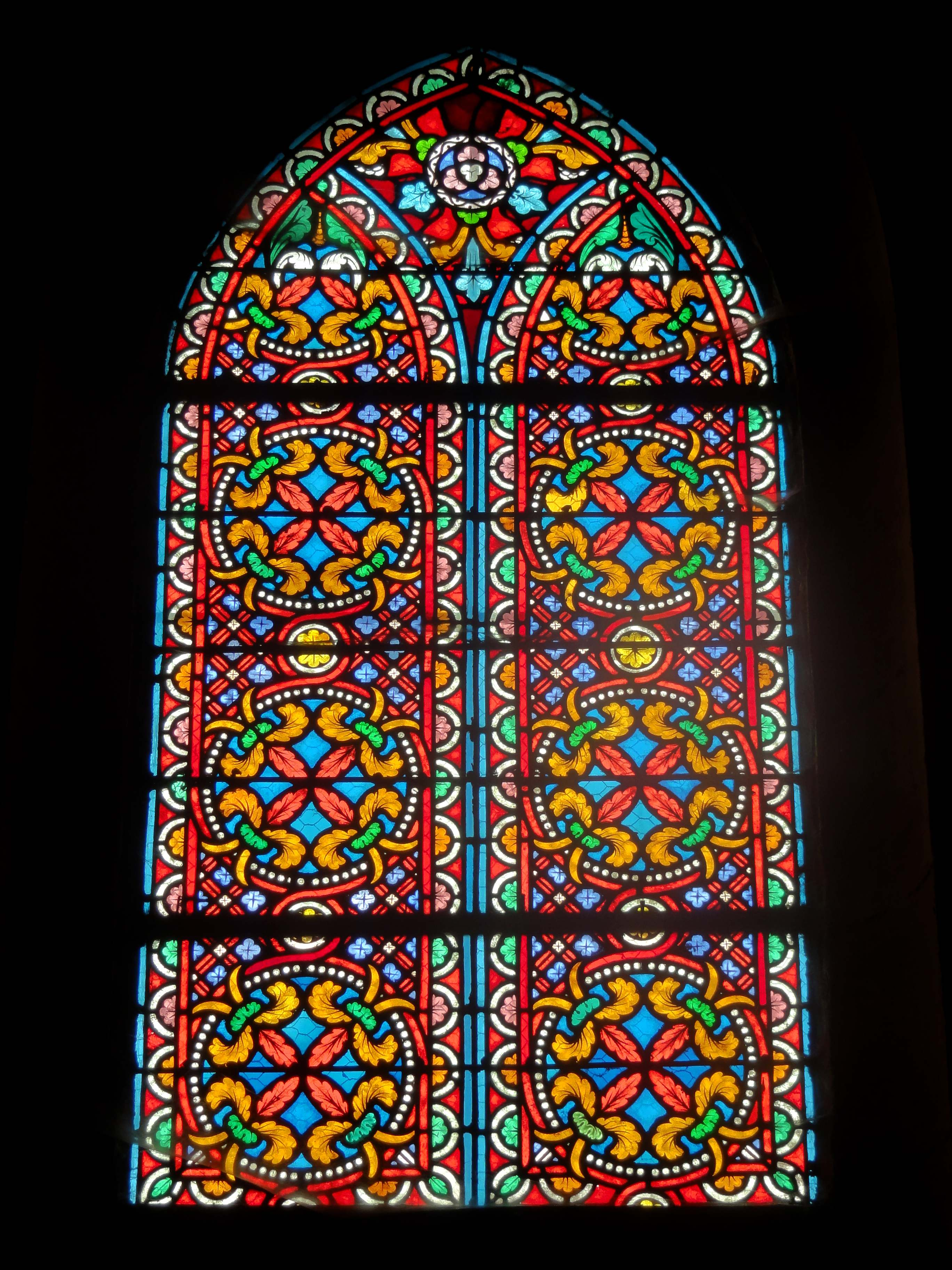 Base du clocher, ancien vitrail de la chapelle de la Vierge refait, dernier quart du XIXe et XXe siècle.